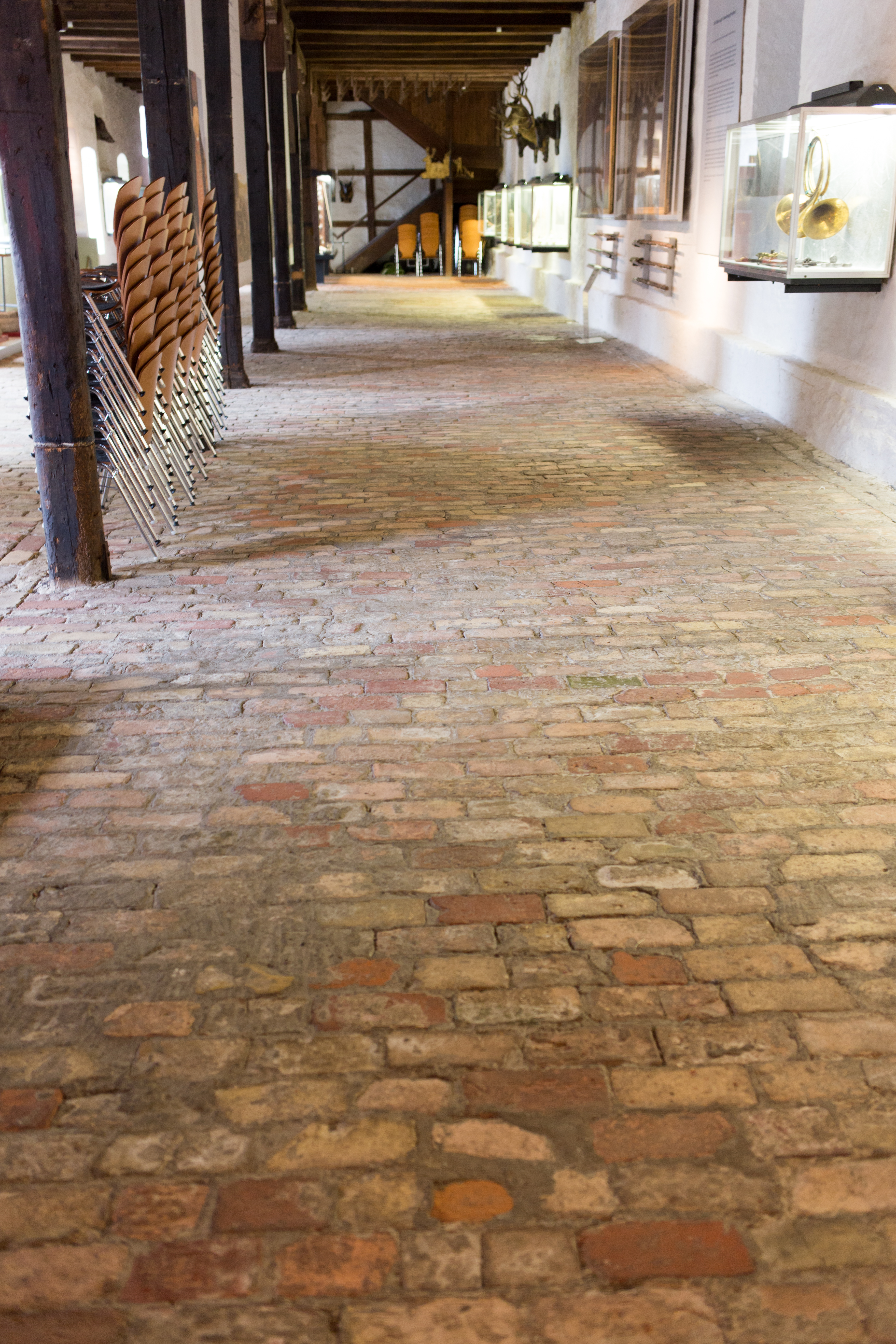 Deitsch: Historischer Boden im Jagdmagazin, der bei Festivitäten abgedeckt werden muss, um ihn vor Fett-, Wein-, Saft- oder anderen Flecken zu schützen.